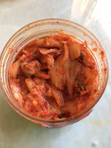 odprt vložen kimči